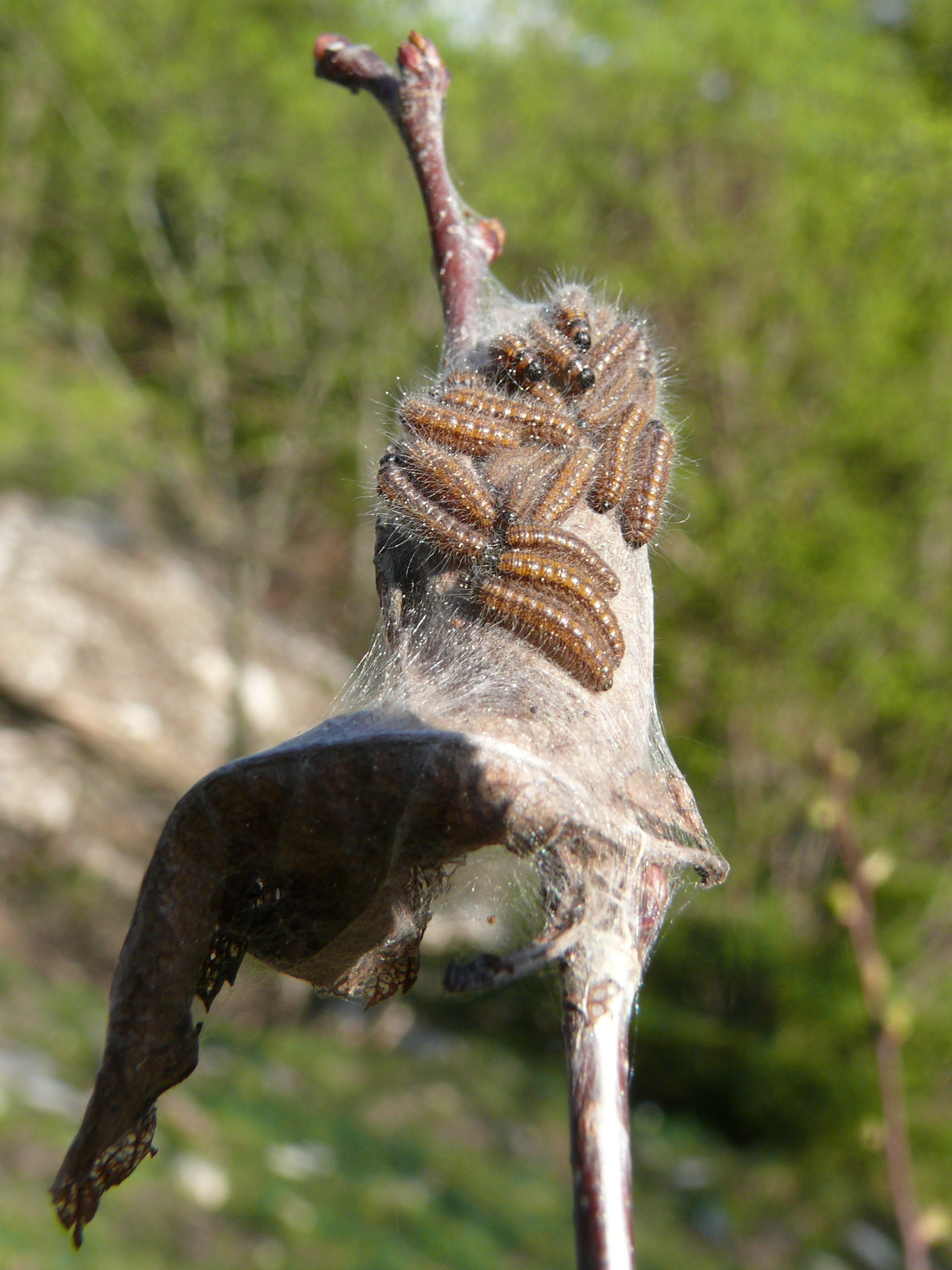 Aporia crataegi